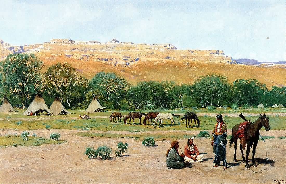 Indian encampment.